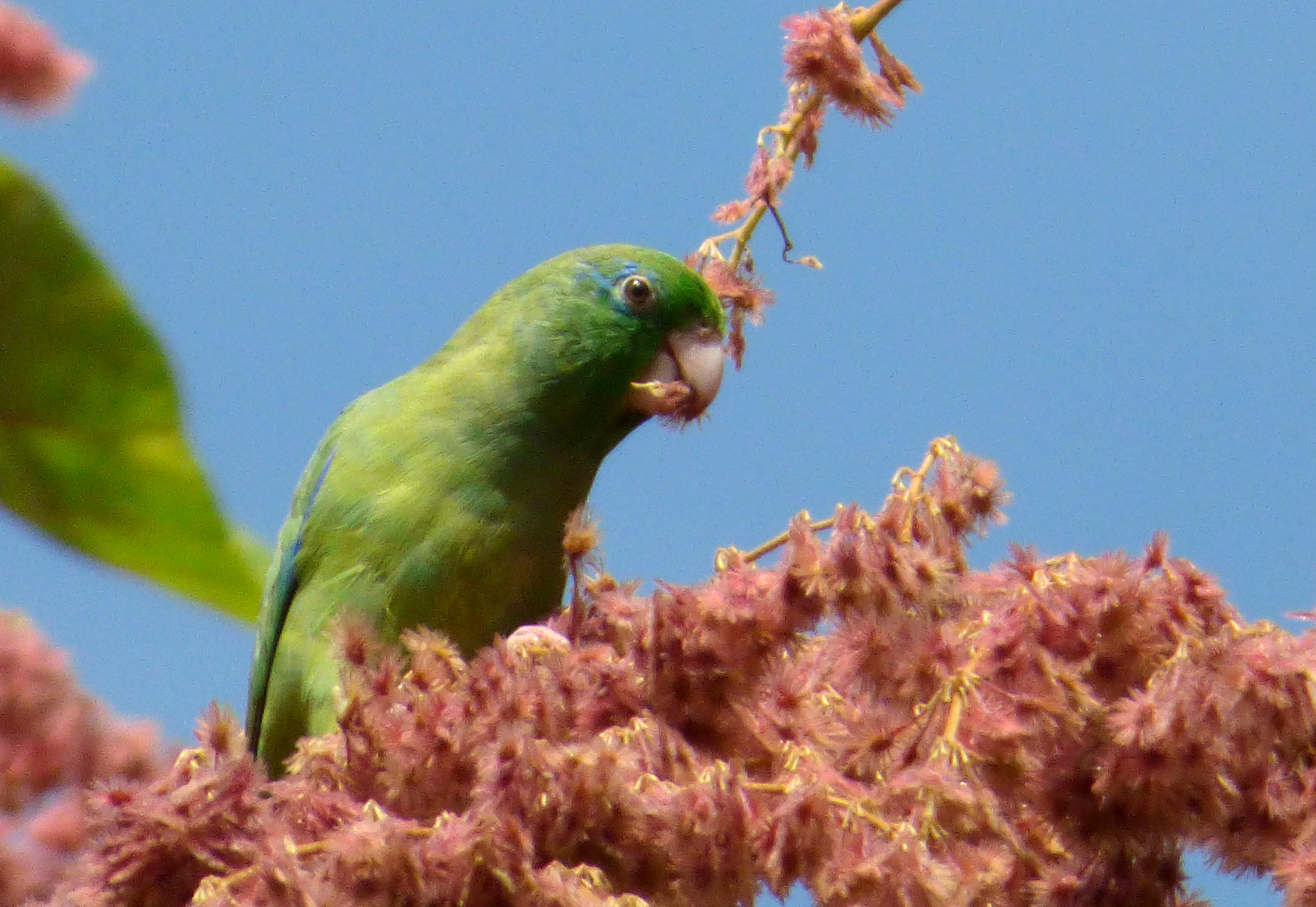 Forpus conspicillatus (Perico de anteojos)